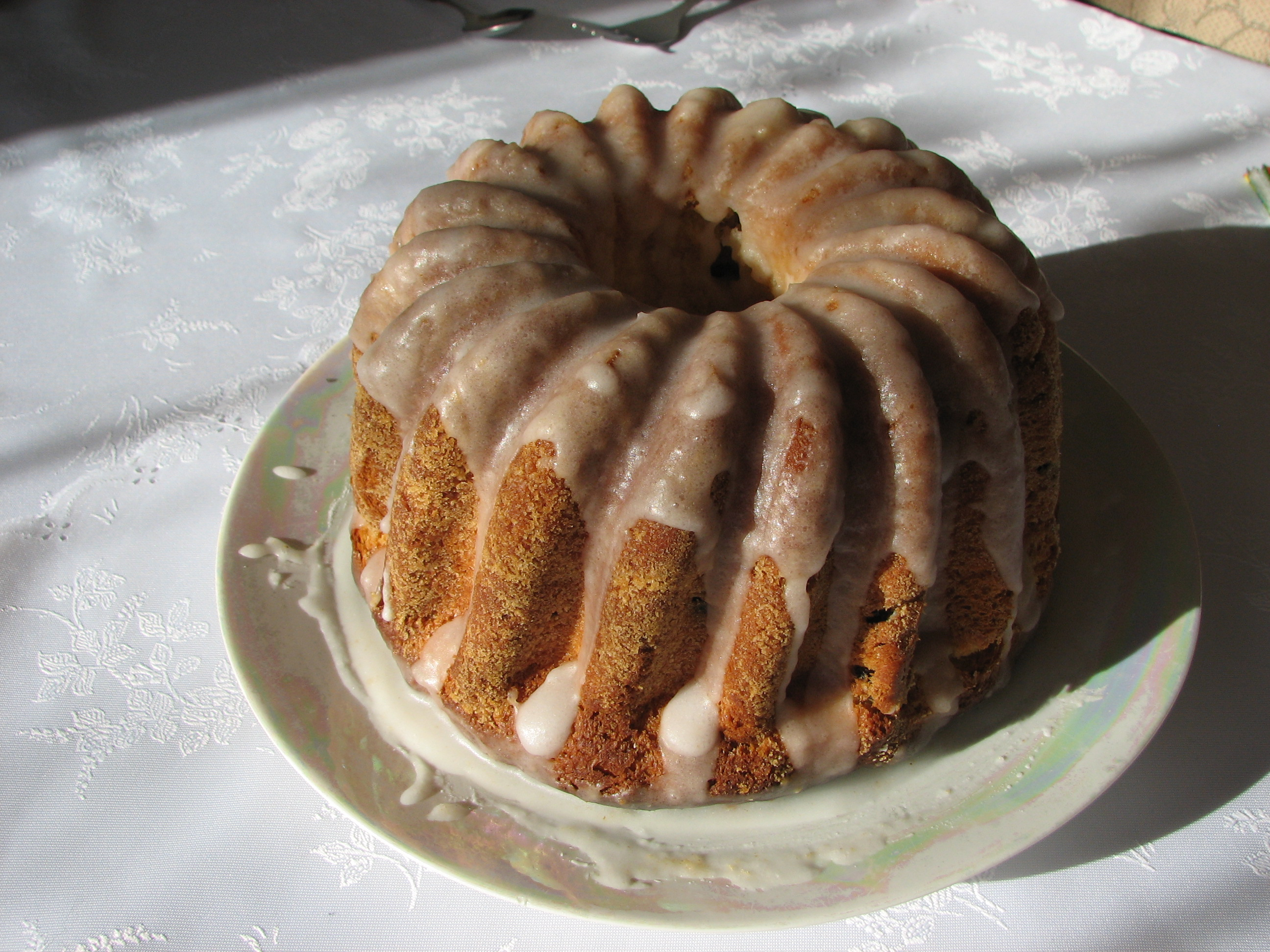 babka świąteczna. This image has been originally created as the illustration for babka w formie entry in crosswords dictionary. It has been released under CC-BY-3.0 license.